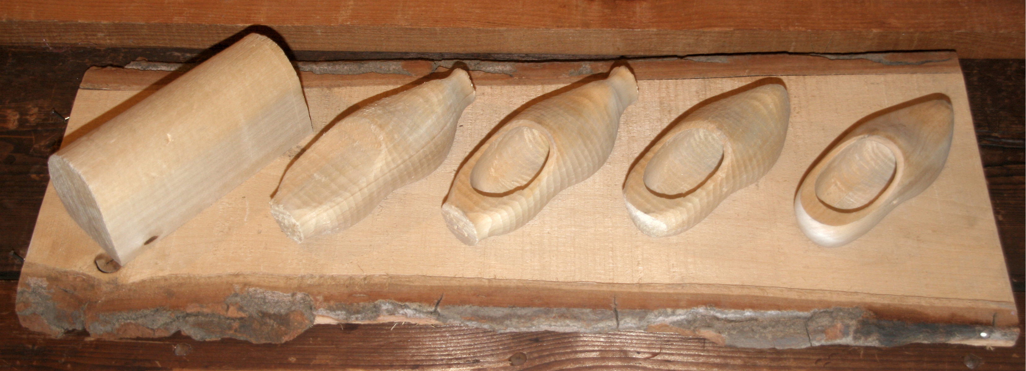 Klompenfabricage: het ontstaan van een klomp in enkele fasen. Gefotografeerd in de klompenmakerij op de Zaanse Schans.